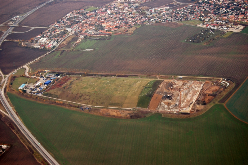 Letecký pohled na skládku Ďáblice